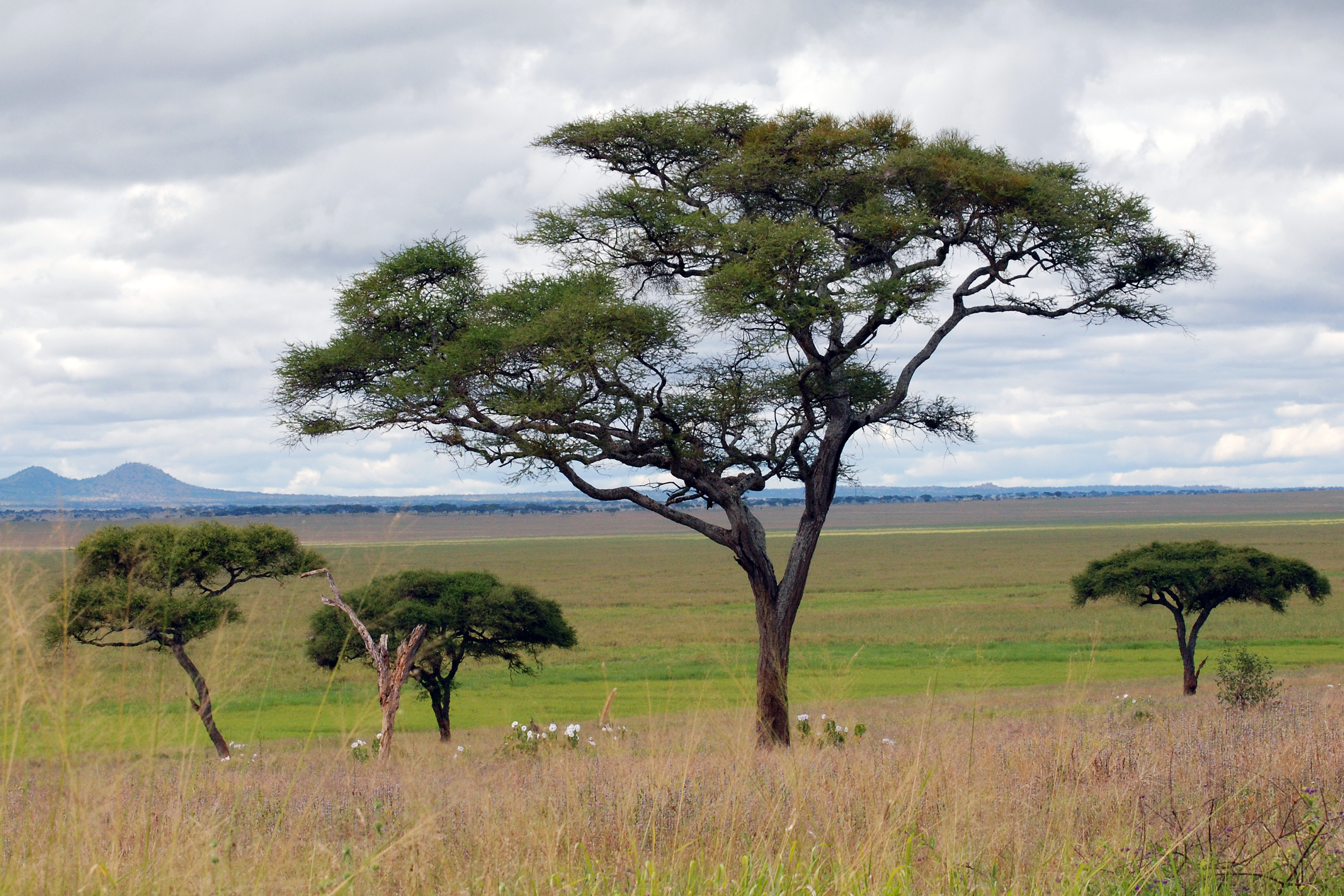 Tarangire National Park